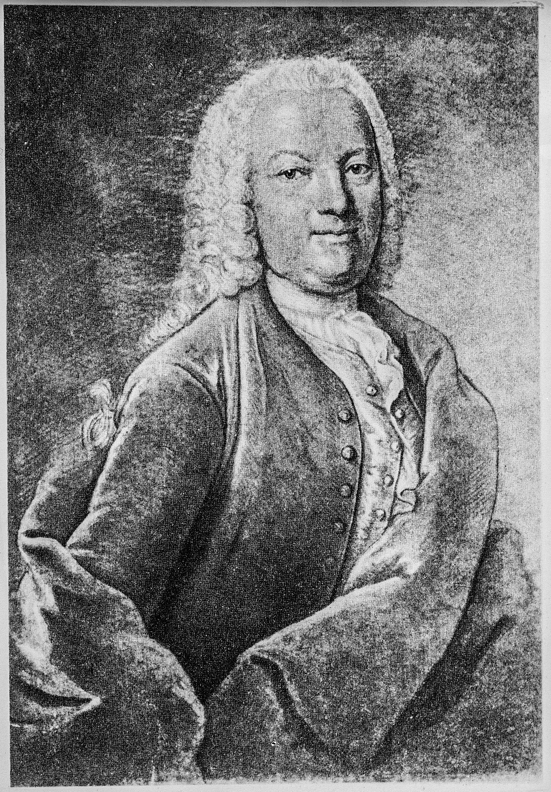 Portrait of Johann Georg Pisendel